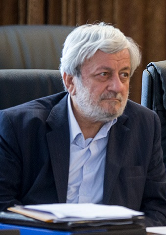 جلسه مجمع تشخیص مصلحت نظام، ۲ تیر ۱۳۹۷